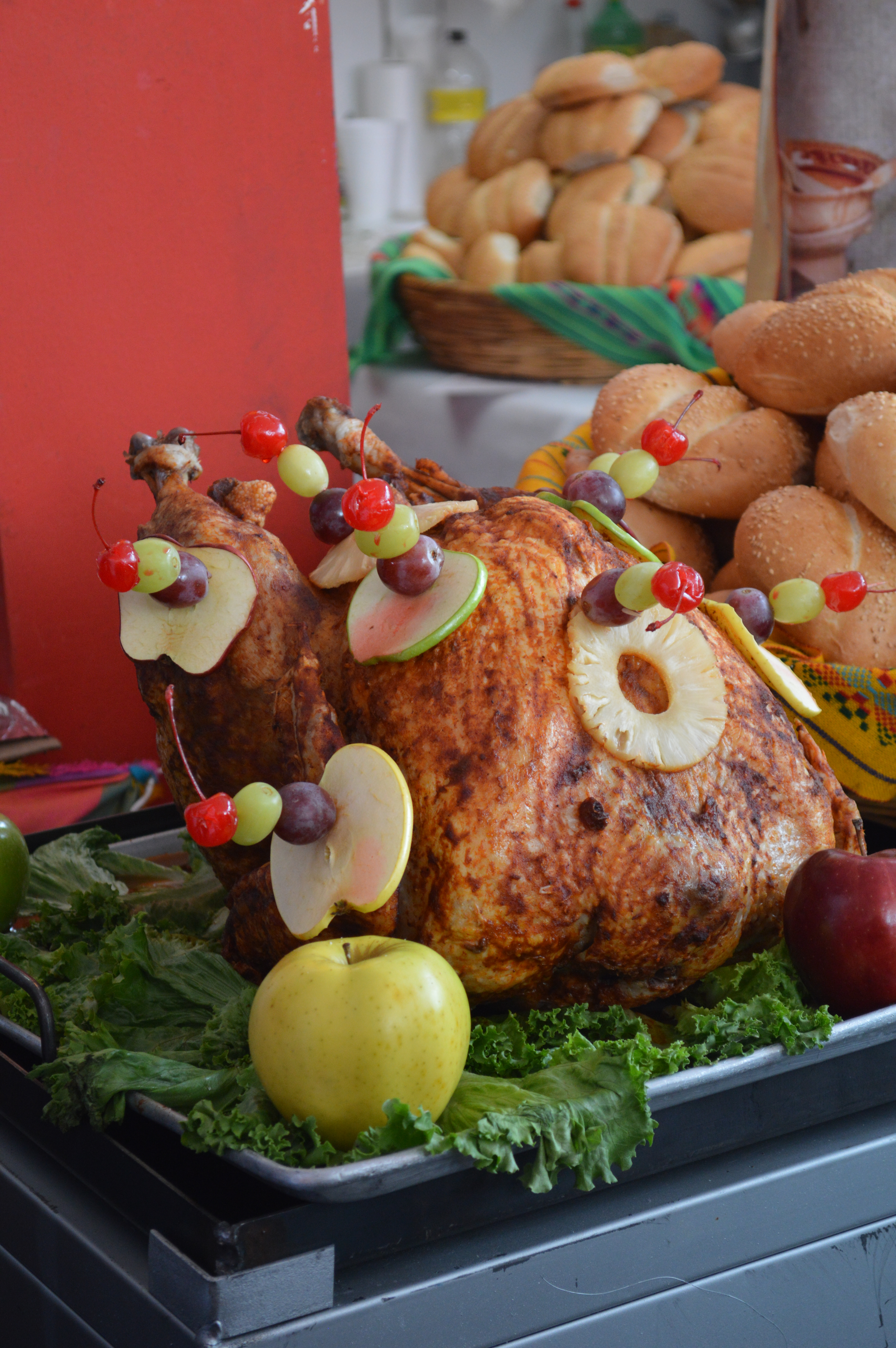 Roasted turkey at a stand at the Feria de la Torta at the Venustiano Carranza borough hall in Mexico City